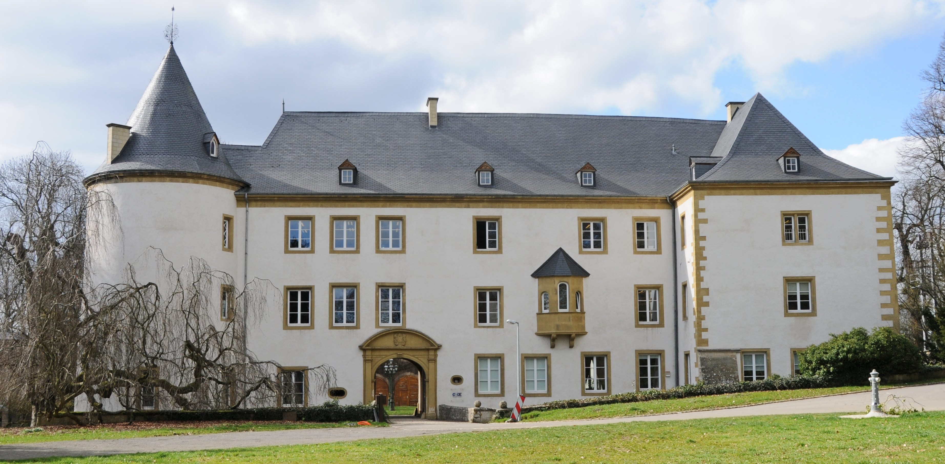 Le château de Sanem (Luxembourg)